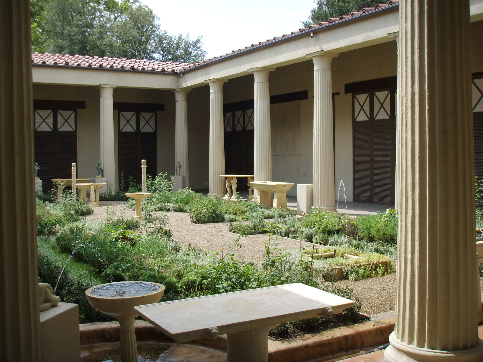 Ricostruzione del giardino della Casa dei Vettii a Pompei (mostra al giardino di Boboli, 2007).